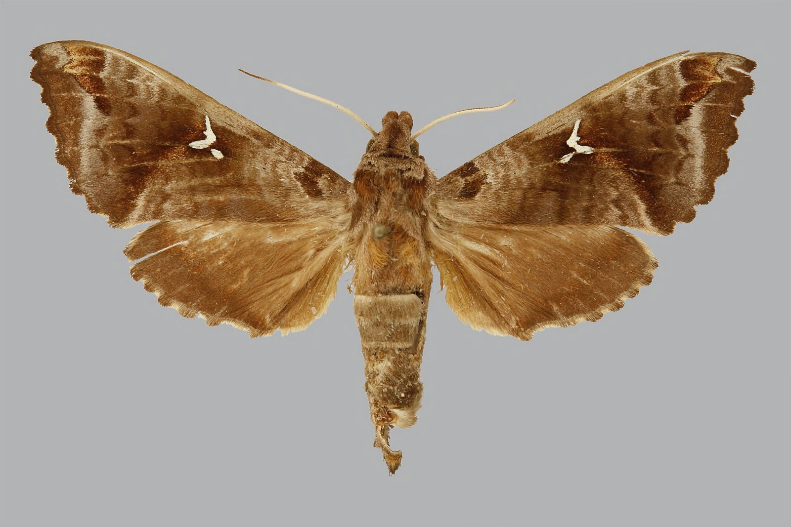 Maassenia disctincta, male, upperside. Madagascar